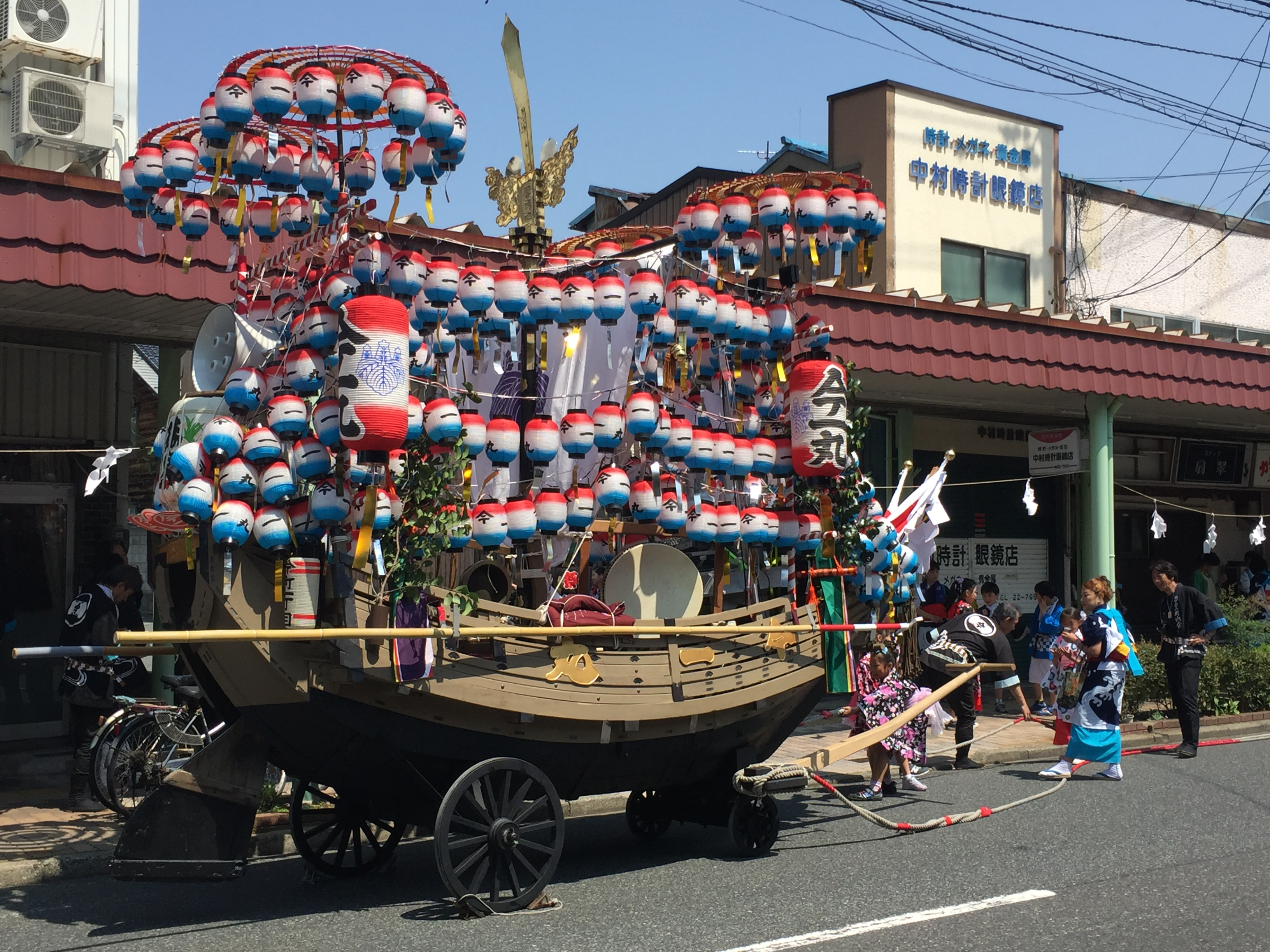 聖大祭屋台（今町一丁目・昼・横景・鳥取市瓦町にて）